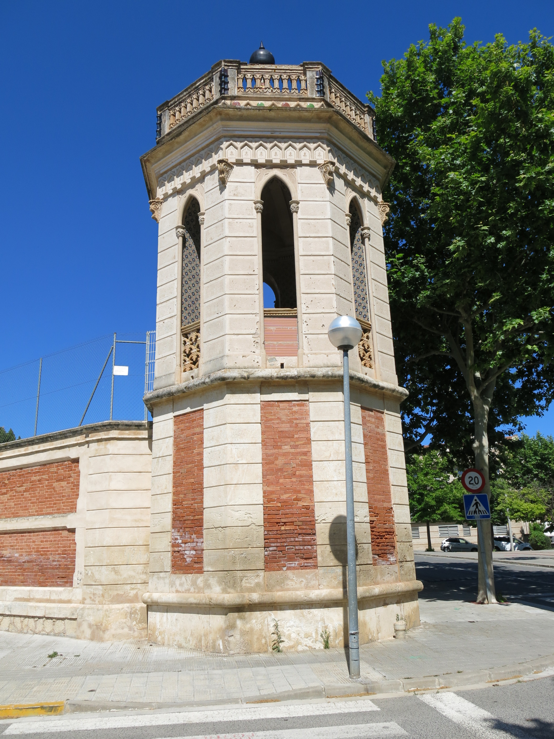 La Residència (l'Arboç)